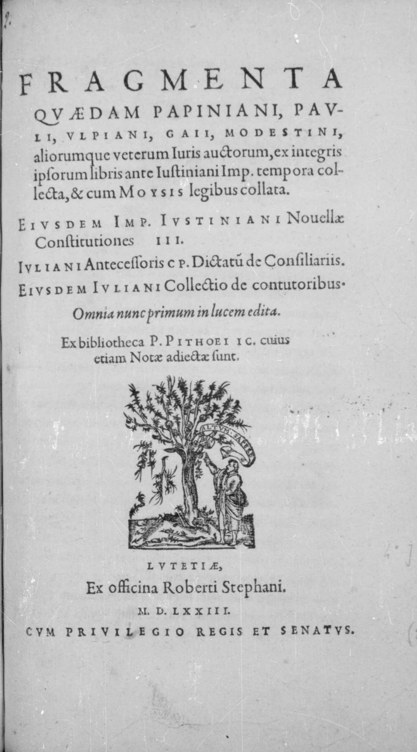 Frontespizio